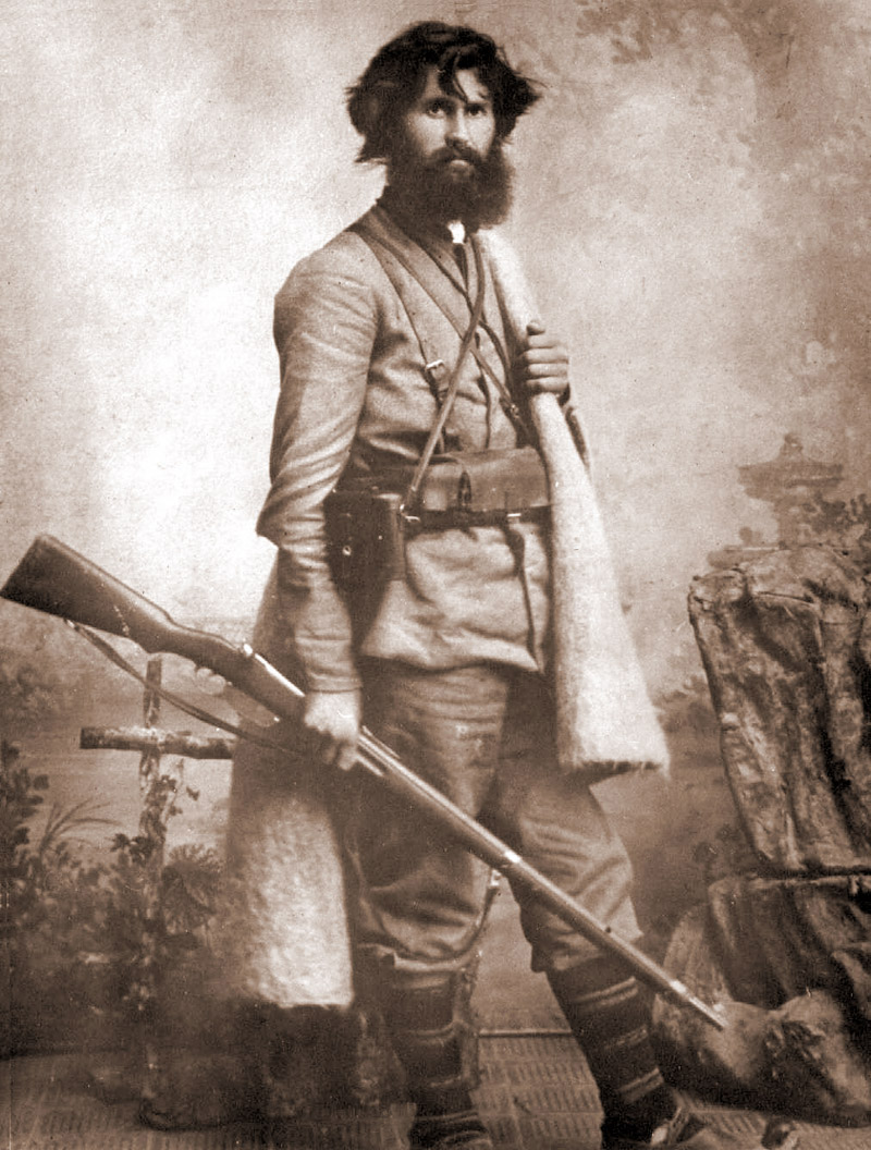 Спиро Олчев.